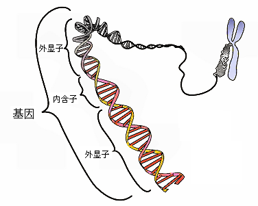 基因示意图